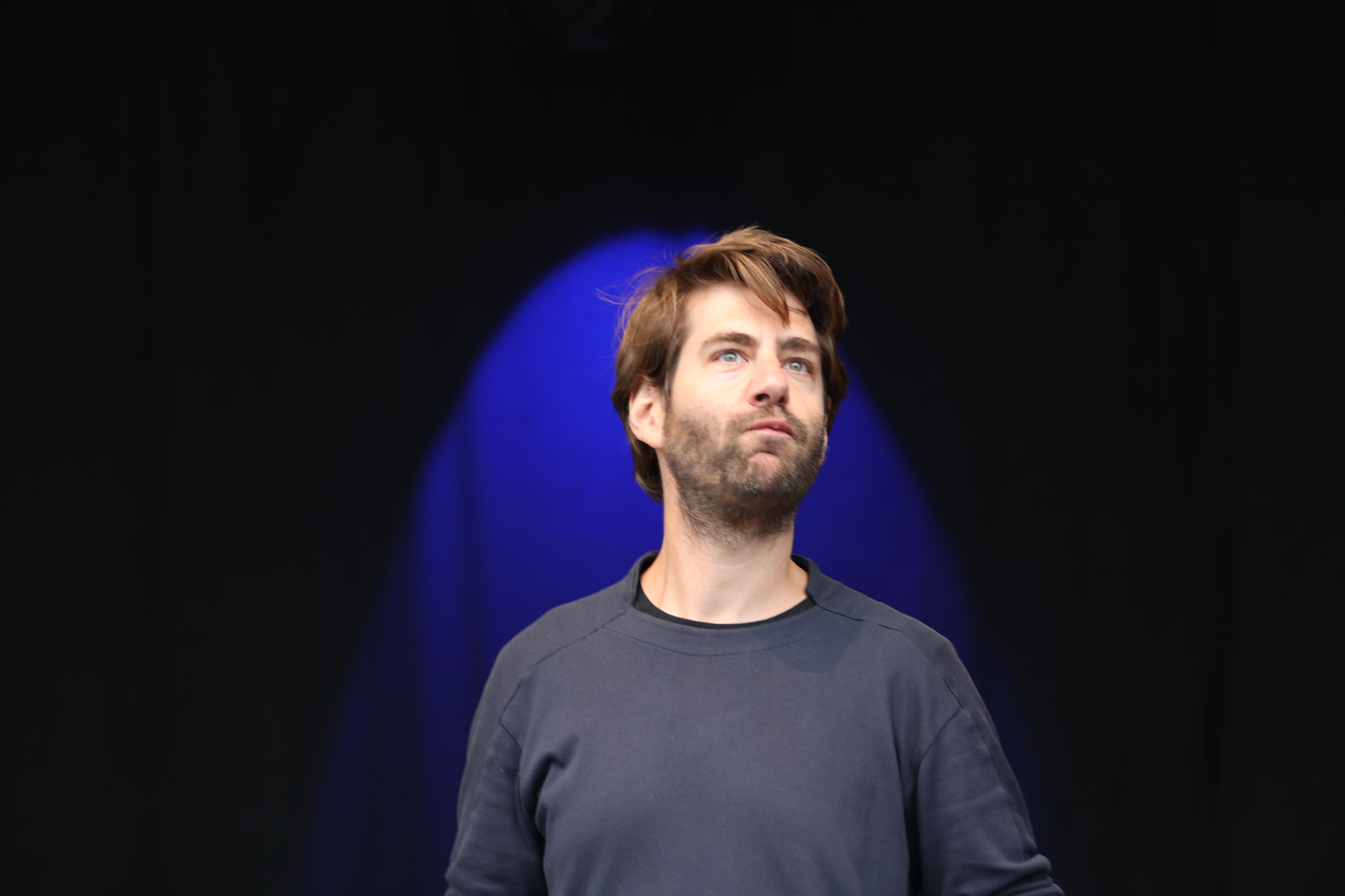 Ausgehetzt, Demonstration in München am 22. Juli 2018 gegen den Rechtsruck in der bayerischen Politik